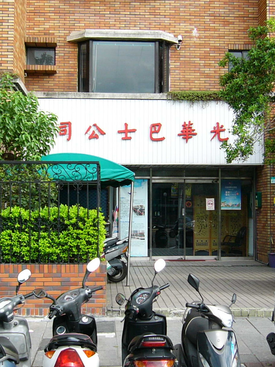 光華巴士總部等於中興巴士集團總部，位於臺灣臺北市士林區中正路499號1樓。